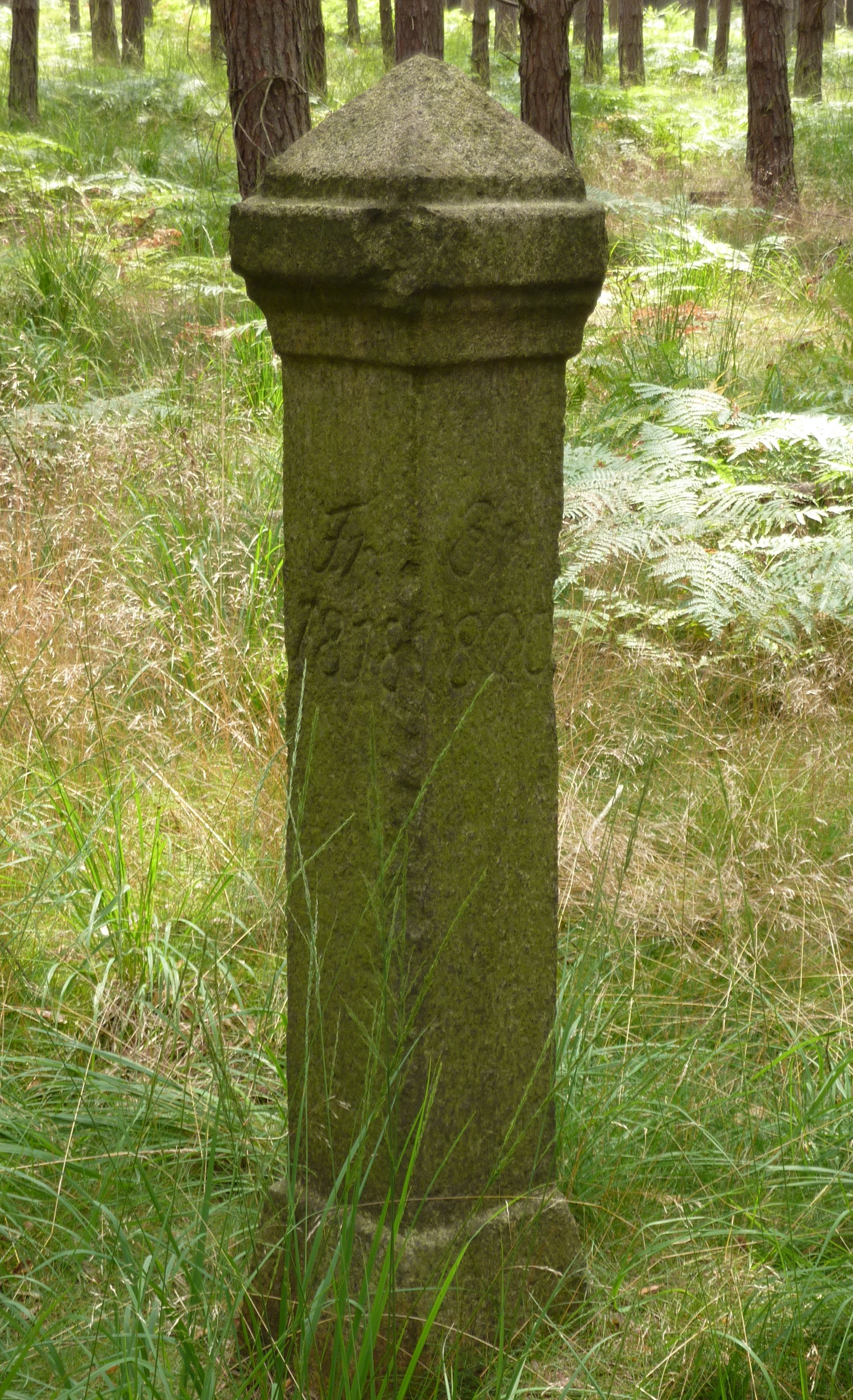 Leipgen, Hohe Dubrau